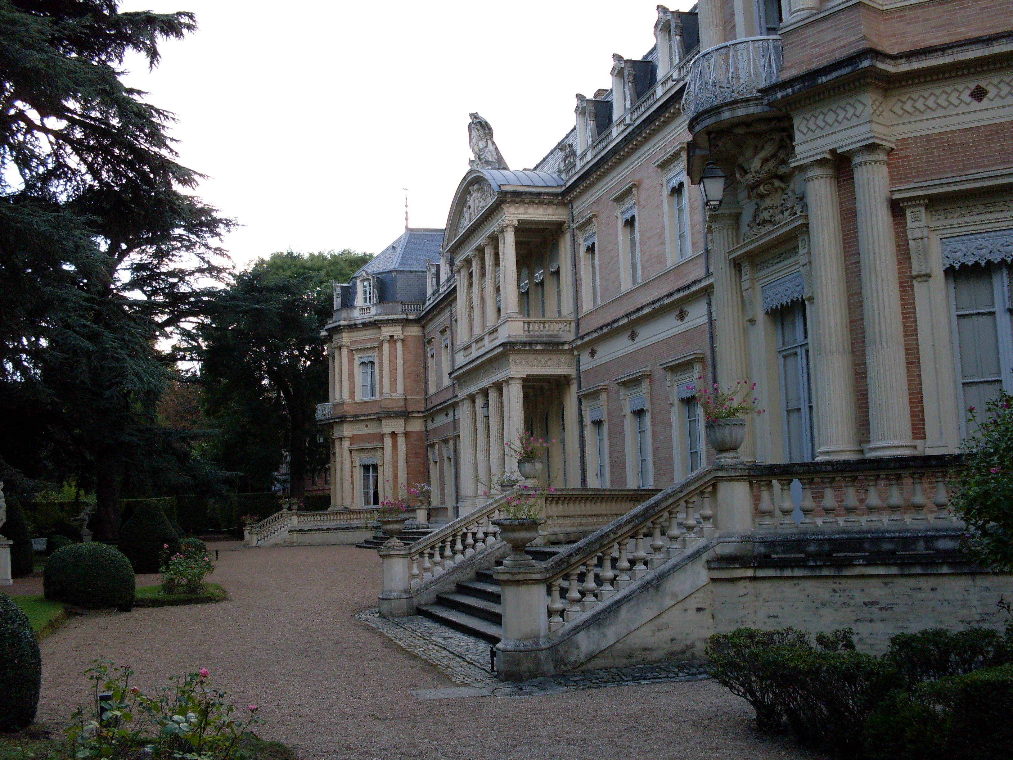 Le Palais Niel, commandement de l'armée de terre, façade sud, Toulouse